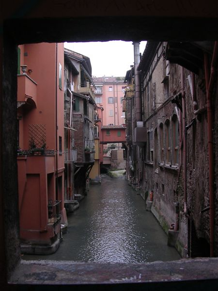 Old canal in Bologna (Canale delle Moline), from a small window